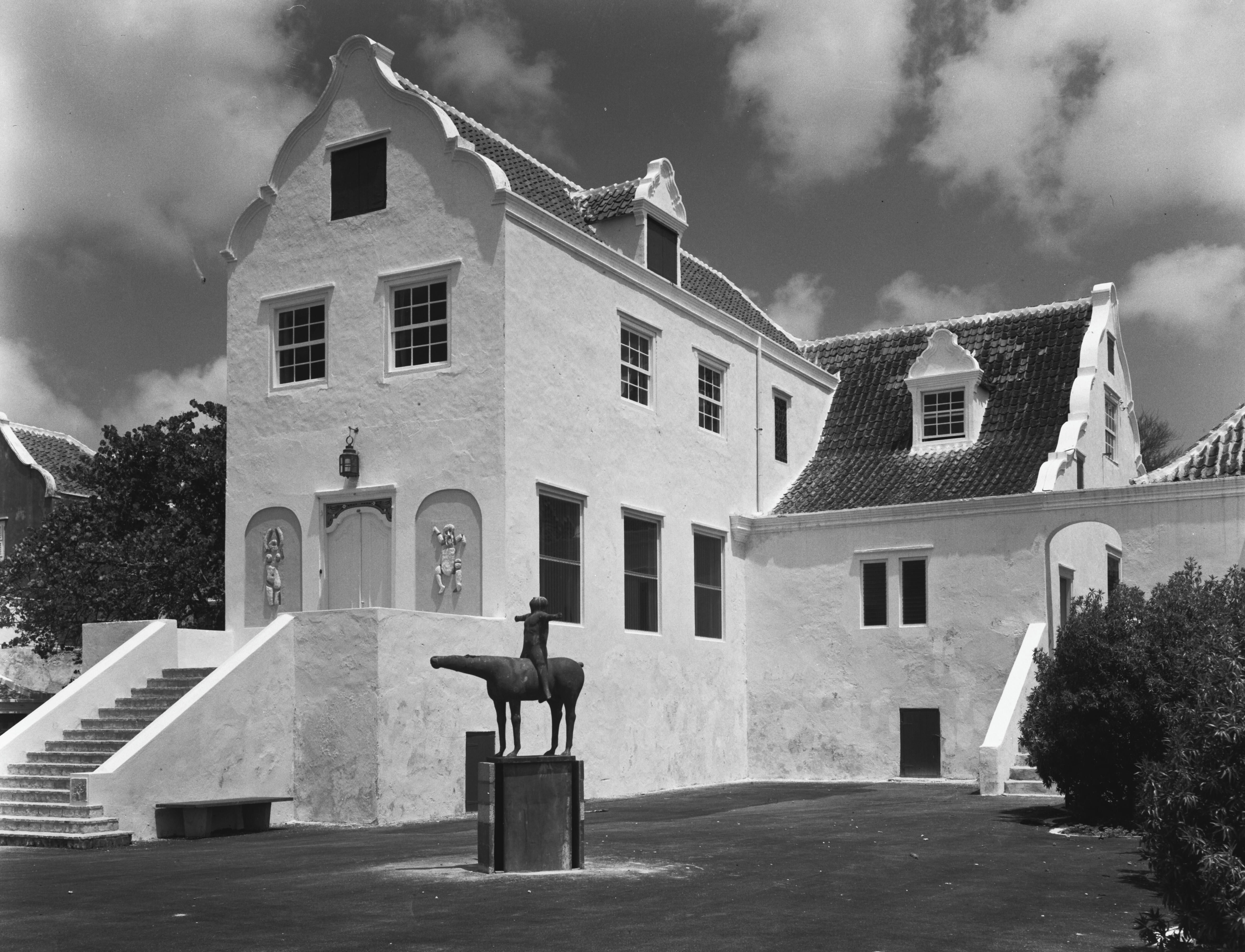 Otrabanda, Huis Stroomzicht, Pater Euwensweg, waterzijdeOnderwerp: Huizen, woningen